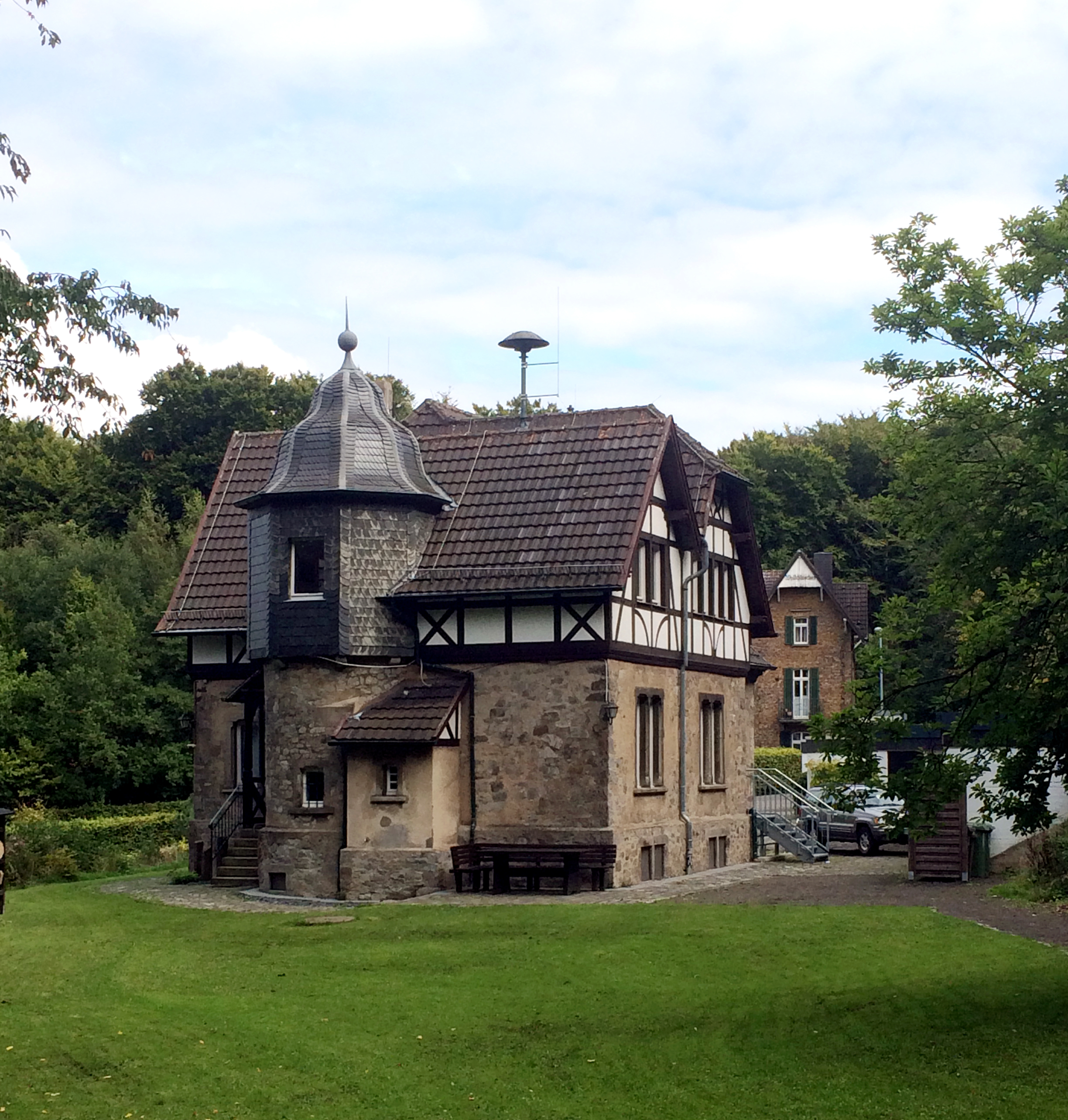 „Naturparkhaus“ des Verschönerungsverein des Siebengebirges (VVS), Löwenburgstraße 2, 53604 Bad Honnef